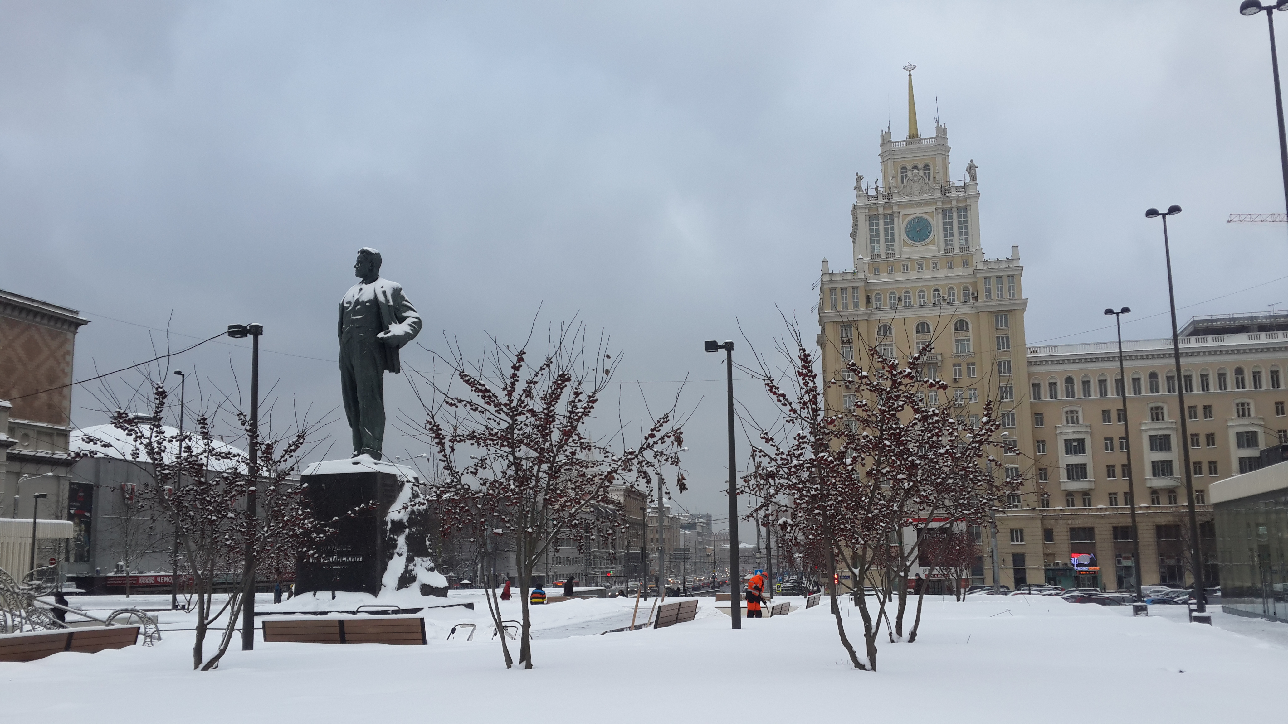 Памятник В.В.Маяковскому: Триумфальная площадь, Тверской, Центральный округ, Москва